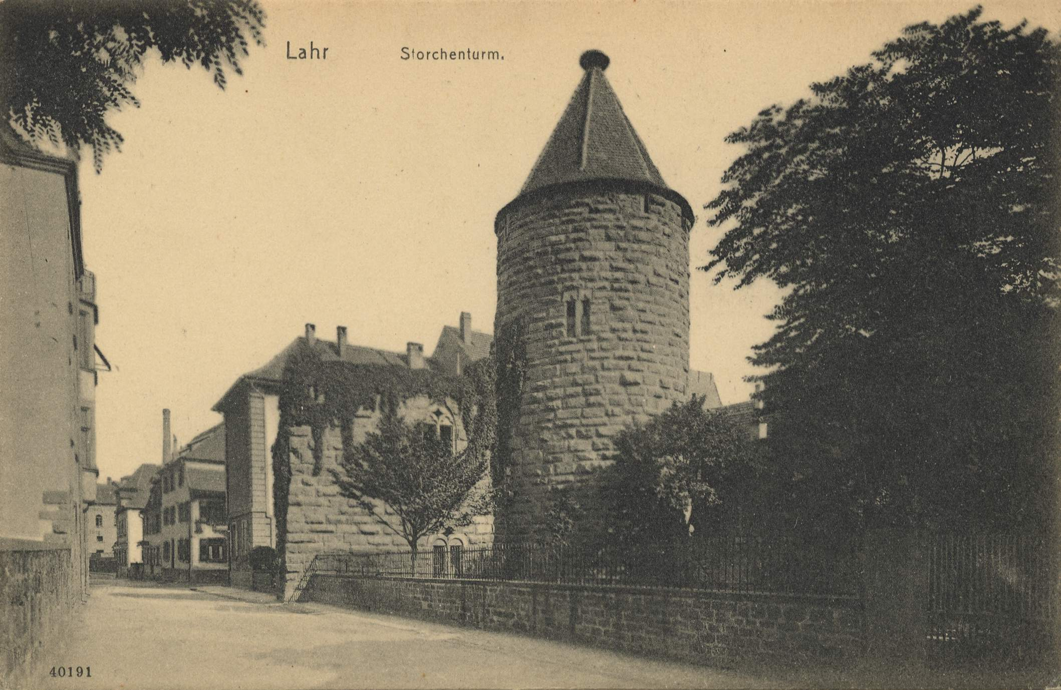 Storchenturm